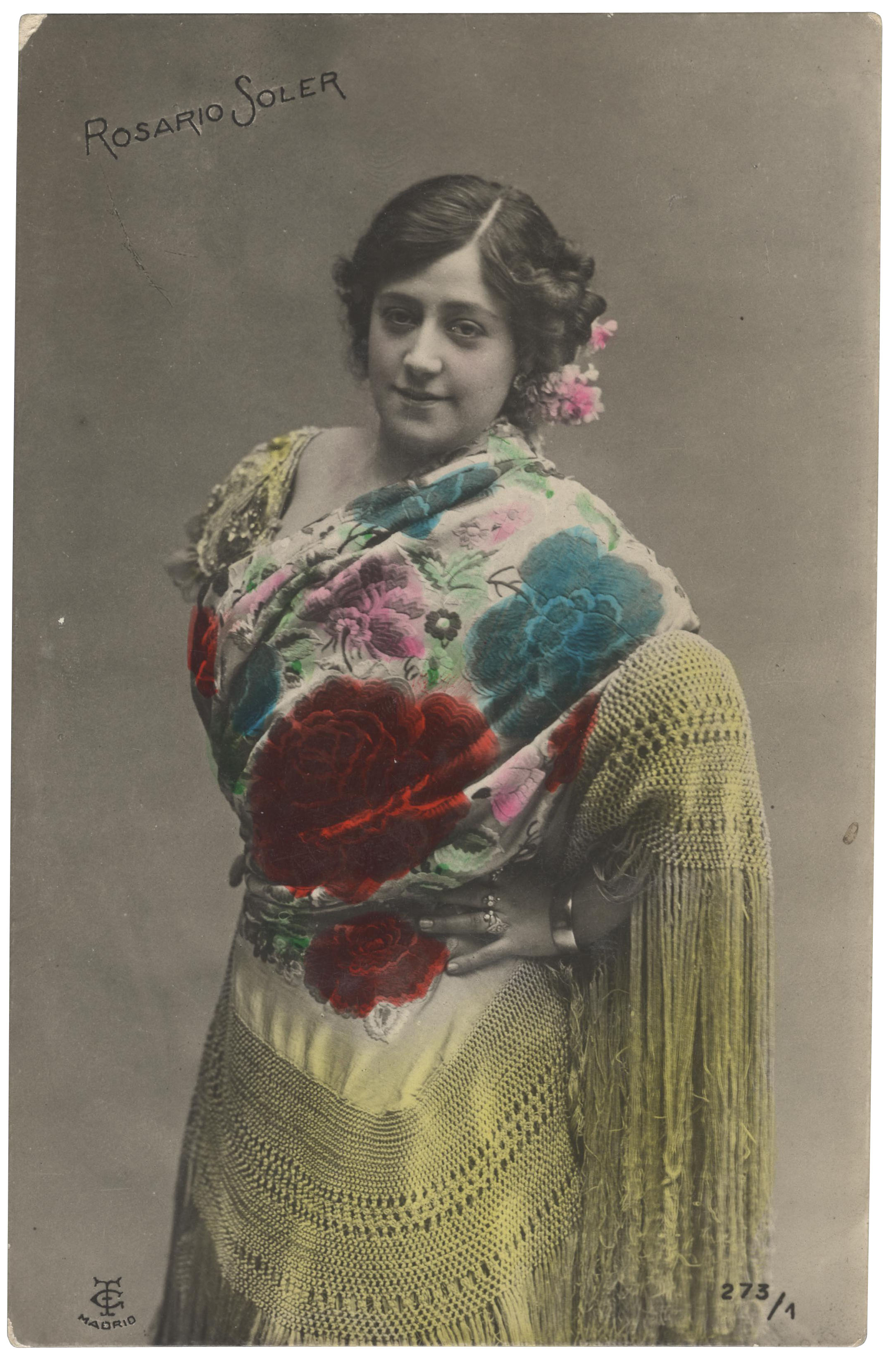 La tiple malagueña Rosario Soler